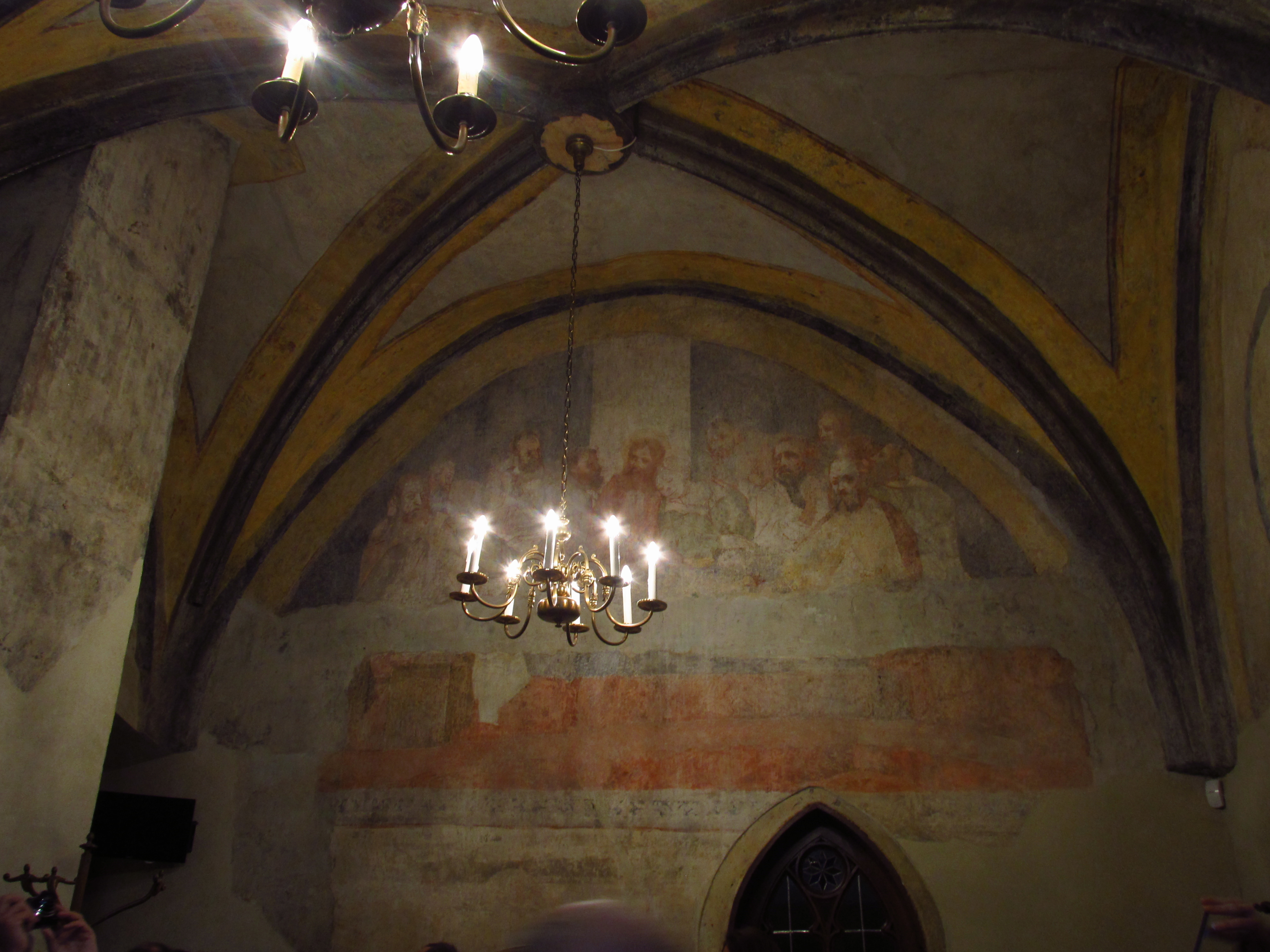 Interiér kostel sv. Haštala, Staré Město, Praha. Sakristie s malbou Poslední večeře Páně z doby kolem roku 1500.